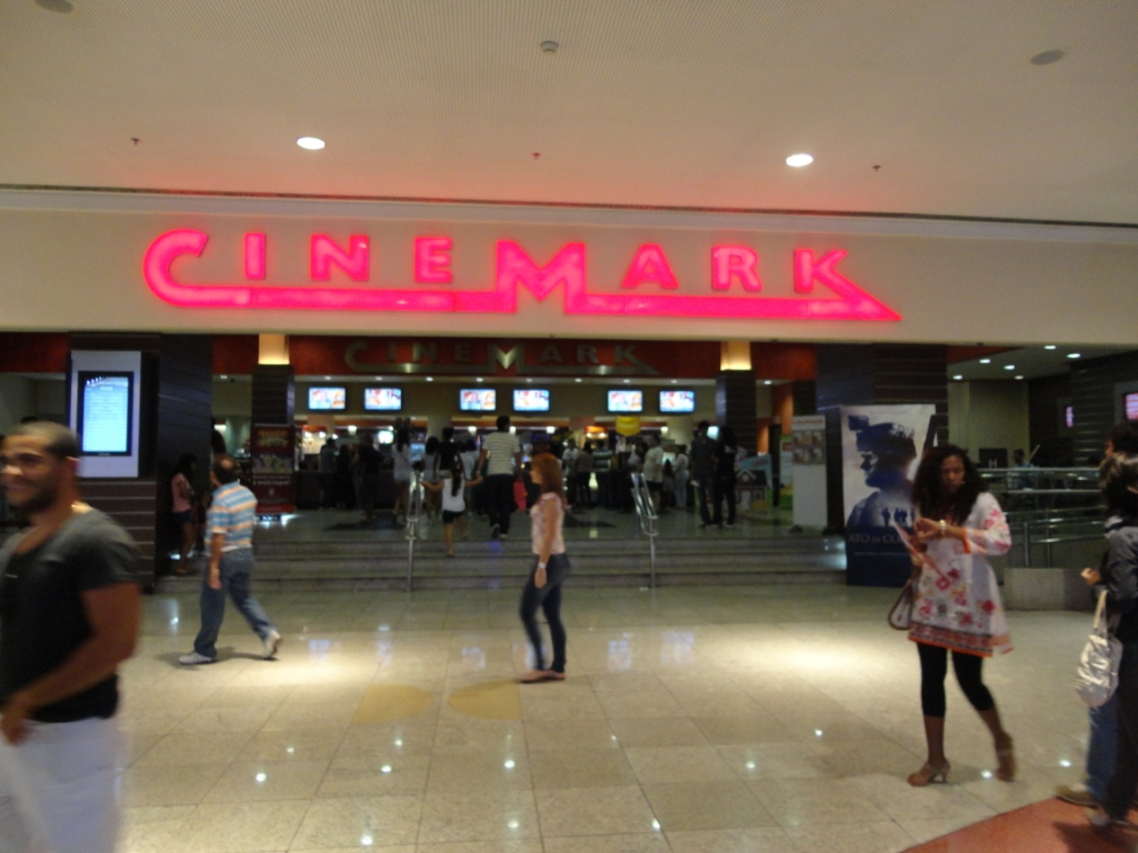 Entrada do Cinemark do Salvador Shopping, de Salvador, BA